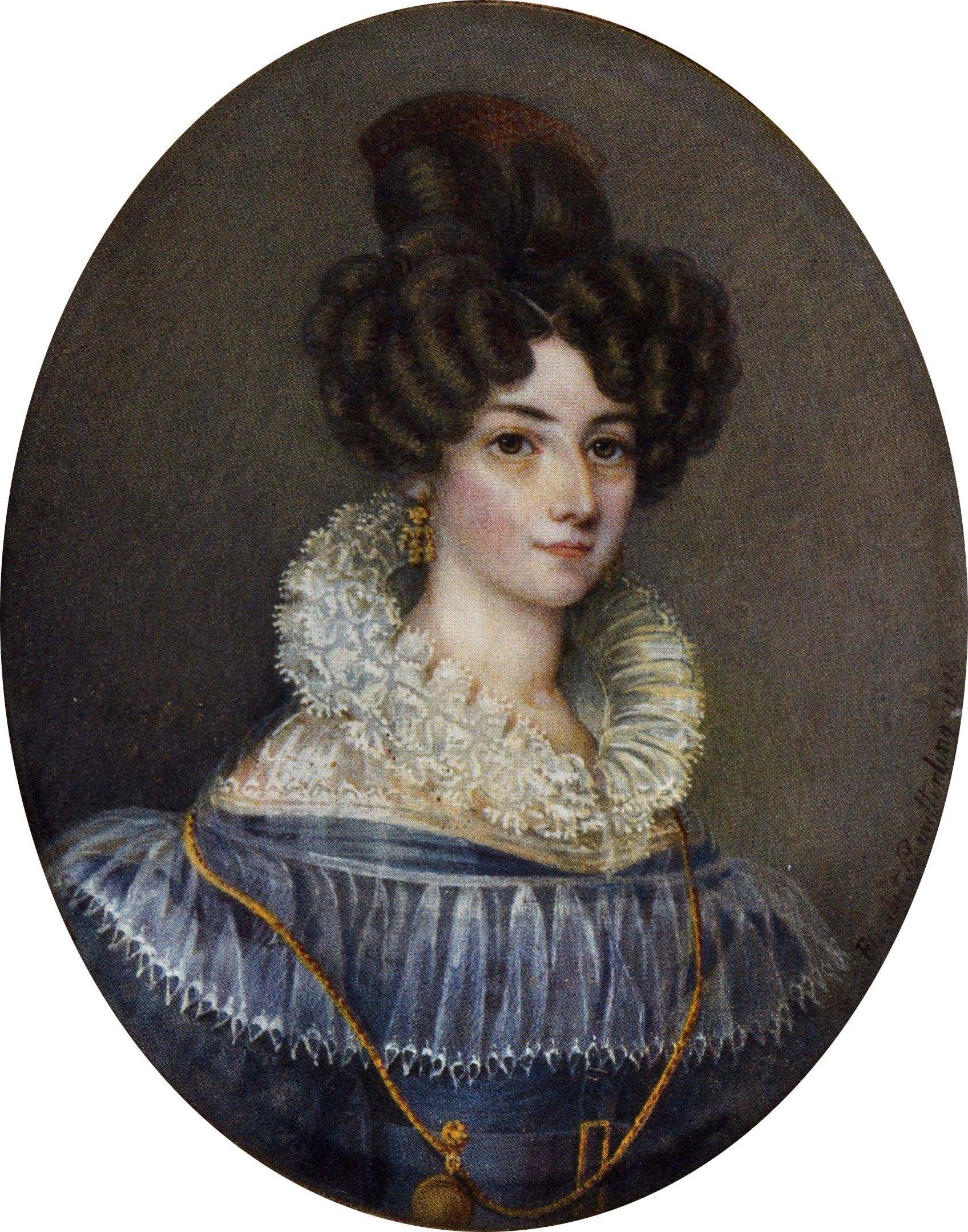 Miniatuur van Johanna Catharina Adelaide Schuyt gemaakt door Elisabeth Barbara Schmetterling (1801-1882)